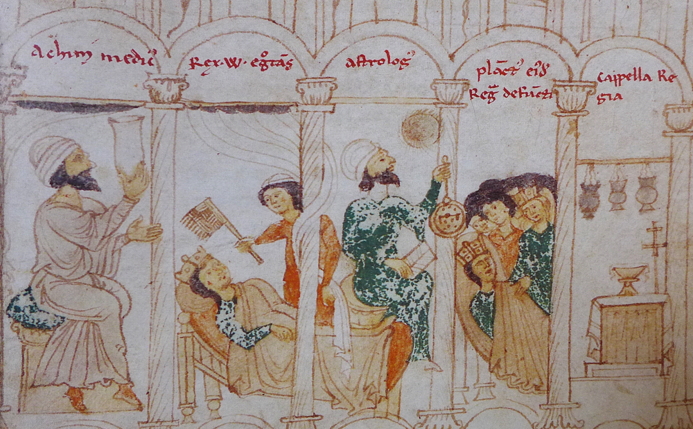 Nemoc a smrt Viléma Sicilského